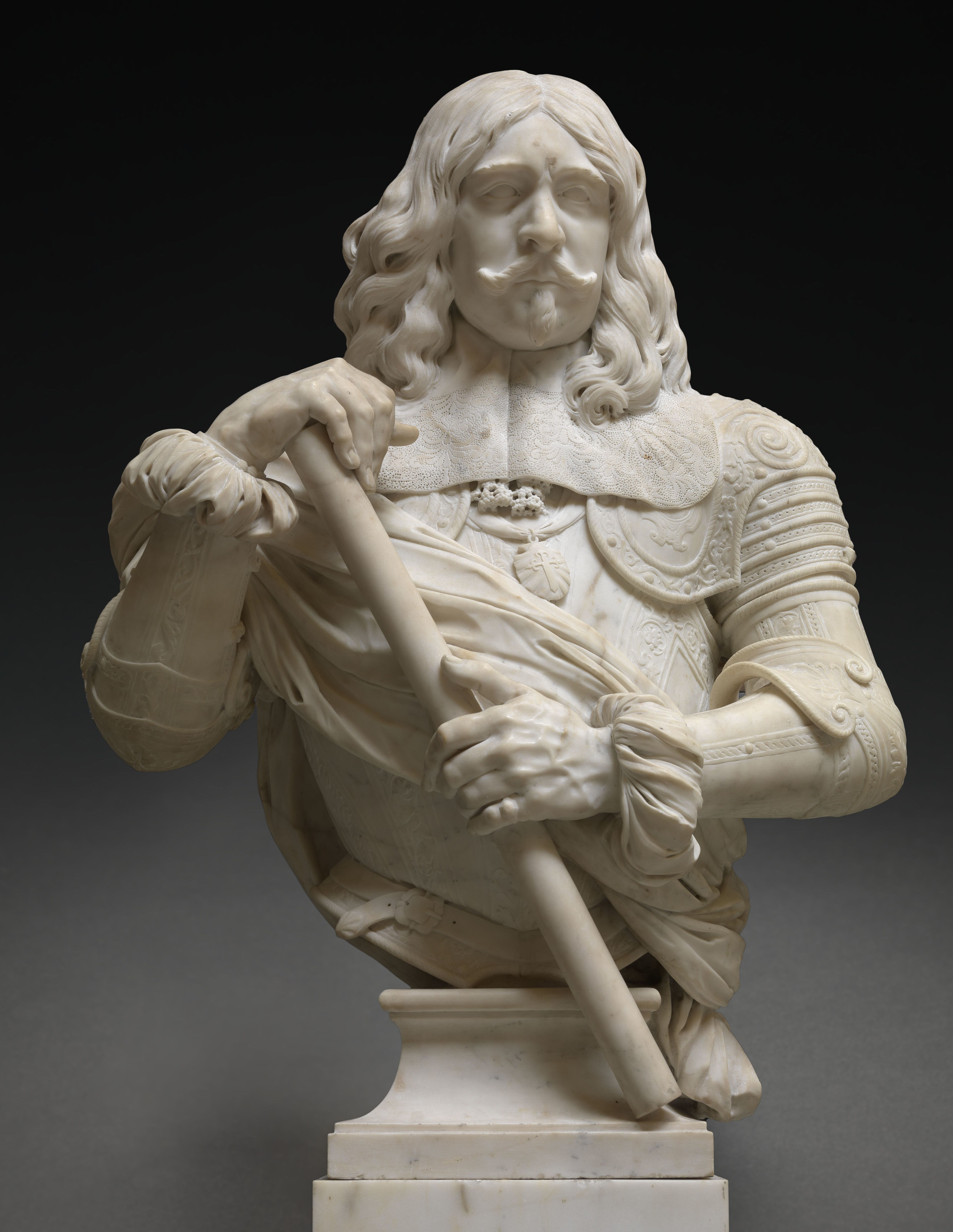 beeldhouwwerk ( Artus Quellinus I( koninklijk museum voor schone kunsten antwerpen